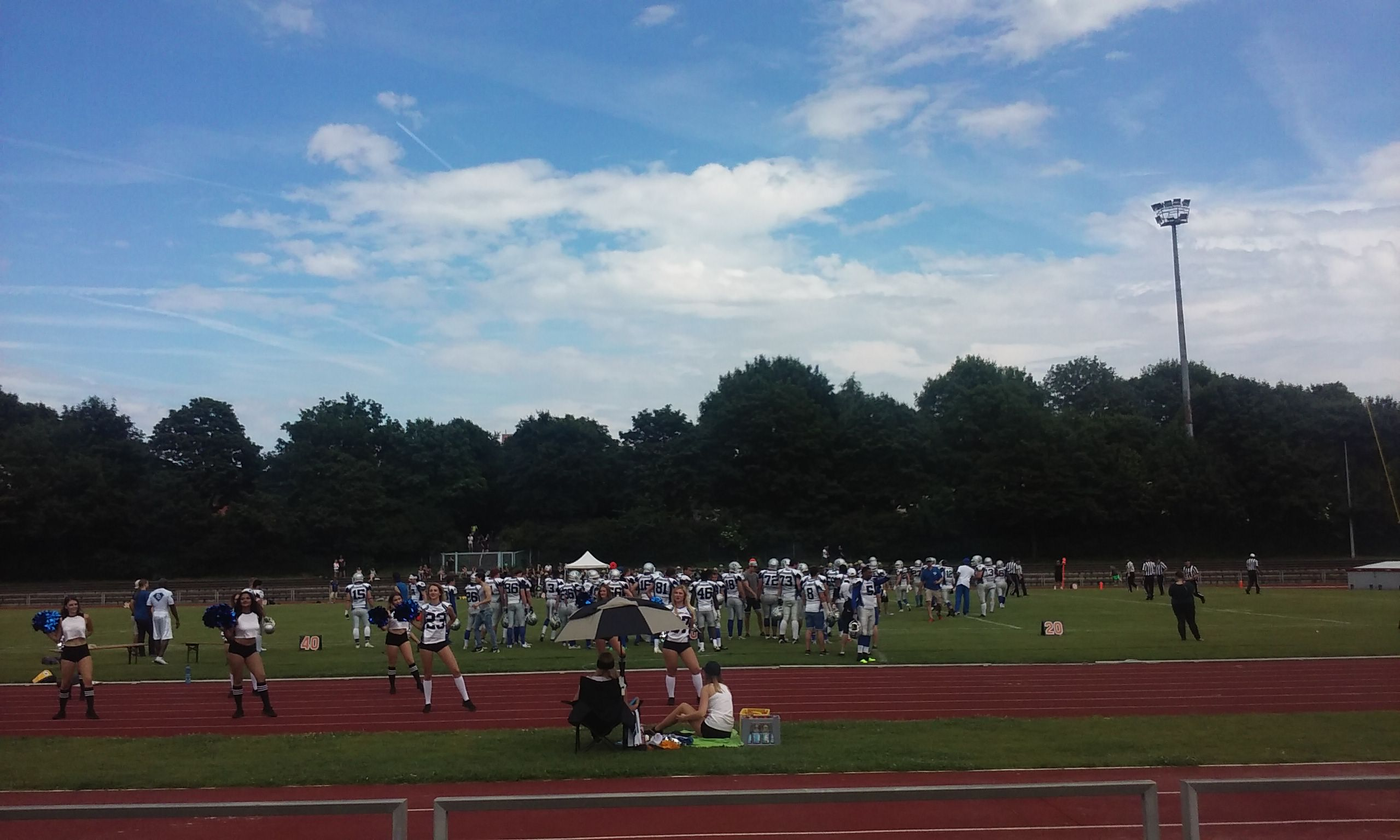 Aufnahme während eines Spieles zwischen den Darmstadt Diamonds und den Mainz Golden Eagles